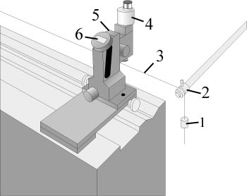 Zeichnung eines Fluchtlinienprüfers